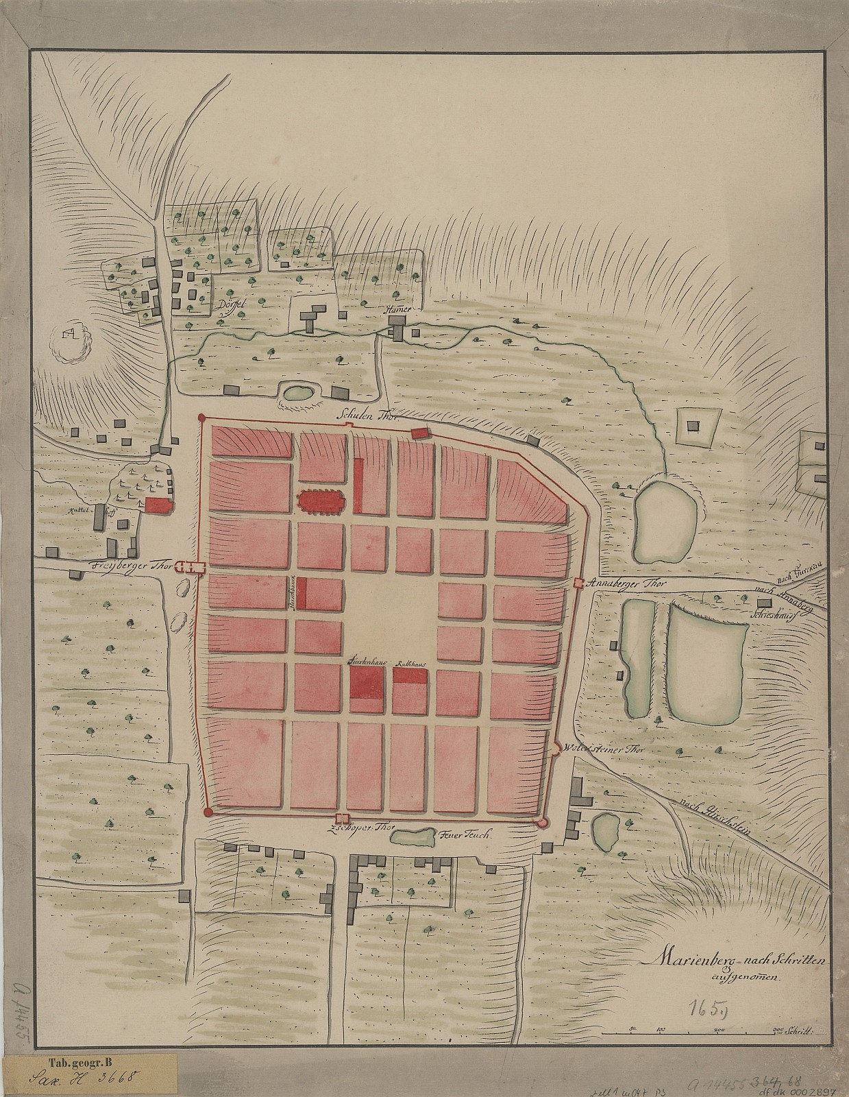 Marienberg : nach Schritten aufgenommen. - [S.l.], [um 1730?]. - 1 Kt. : kolor. Handzeichng. ; 34 x 42 cm